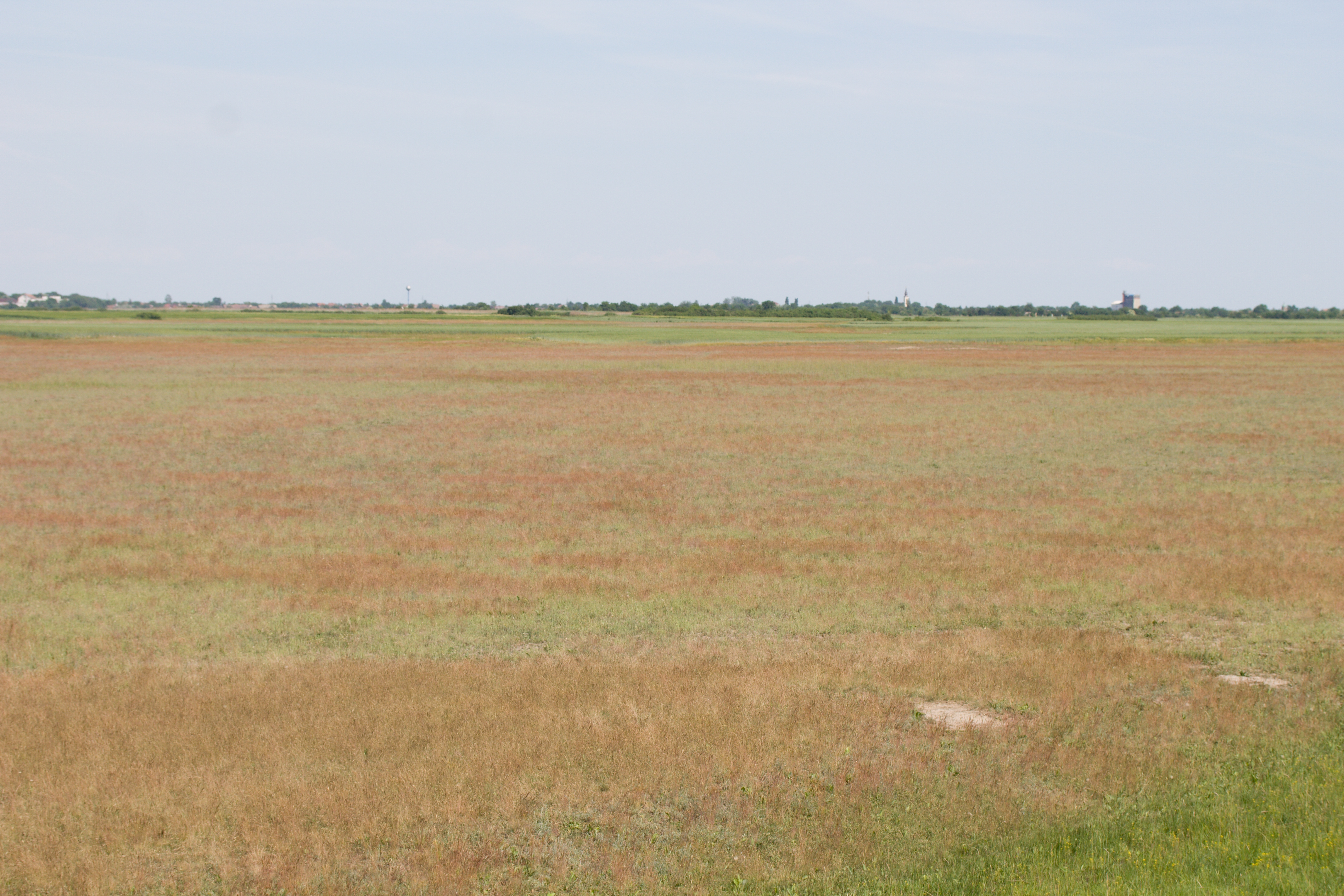 Slatinska livada sa tipičnom slatinskom vegetacijom.